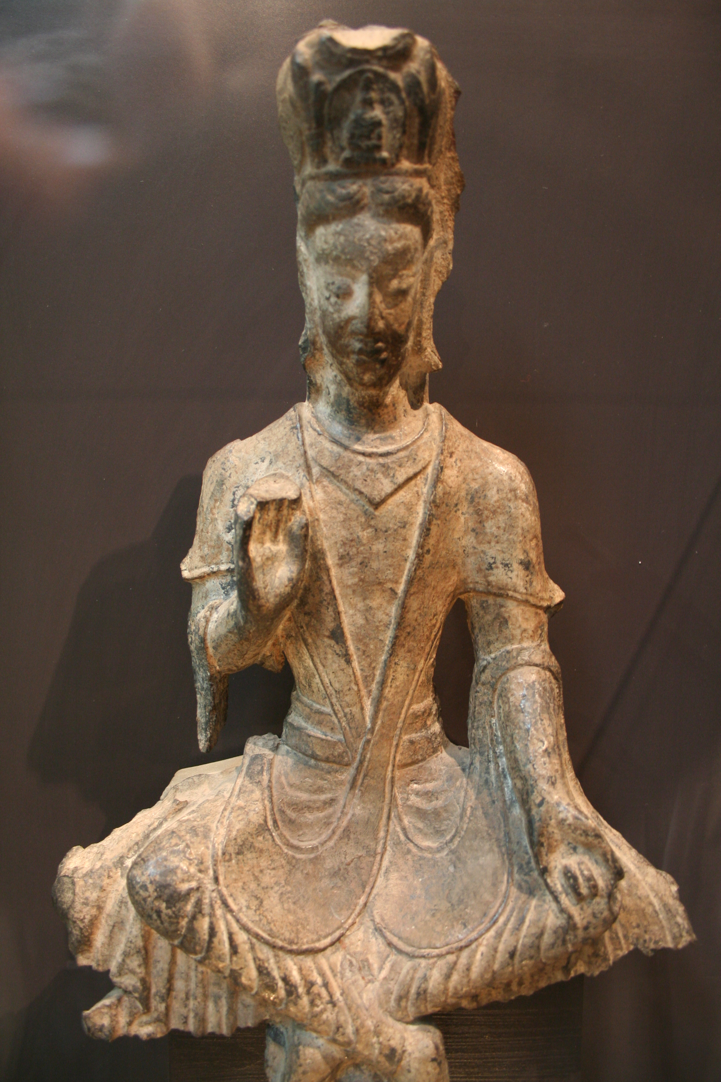 Le Bodhisattva Avalokitesvara. Grès. Longmen (?) Henan. Fin du Ve siècle, dynastie des Wei du nord (386-534).